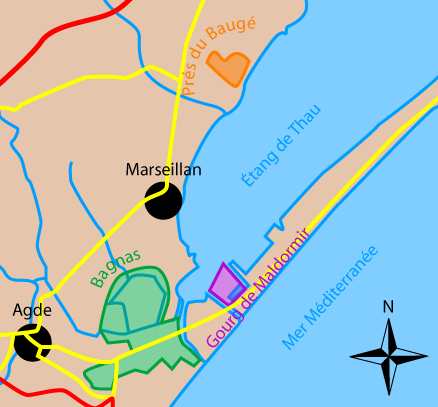 Espaces protégés autour d'Agde et Marseillan.